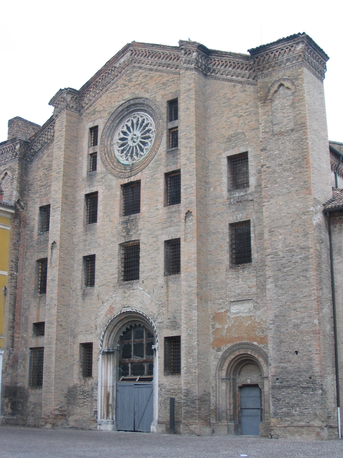 Parma, Emilia Romagna, Italia